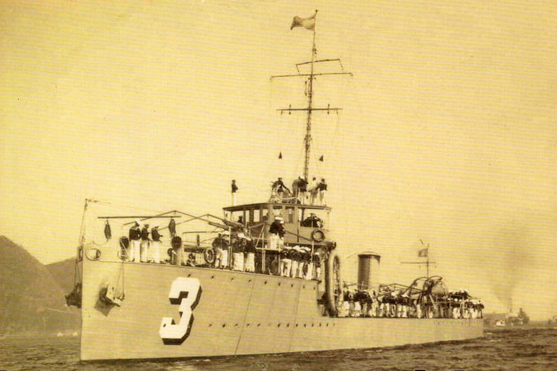 CT Piauhy (CT-3), navio tipo contratorpedeiro da Marinha do Brasil. Estaleiro: Yarrow Shipbuilders